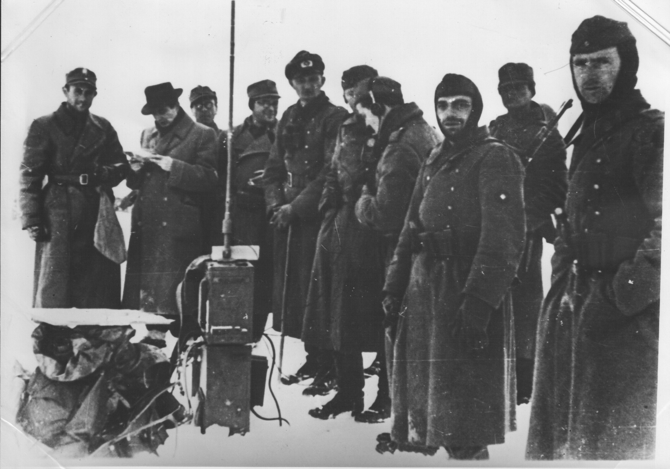 Srpskohrvatski / српскохрватски: Delovi 718. nemačke divizije pod Ozrenom, u borbama protiv partizana, neposredno pre Igmanskog marša.[1]